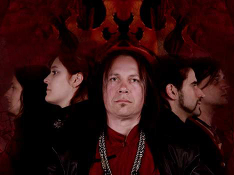 "Bock auf Rock"